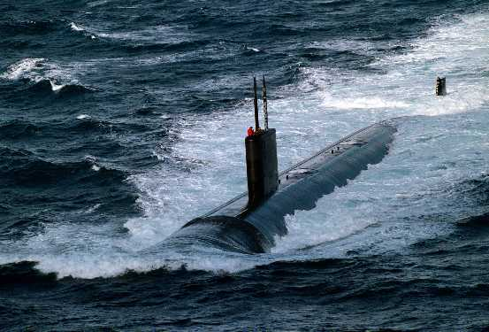 USS Columbia (SSN-771)